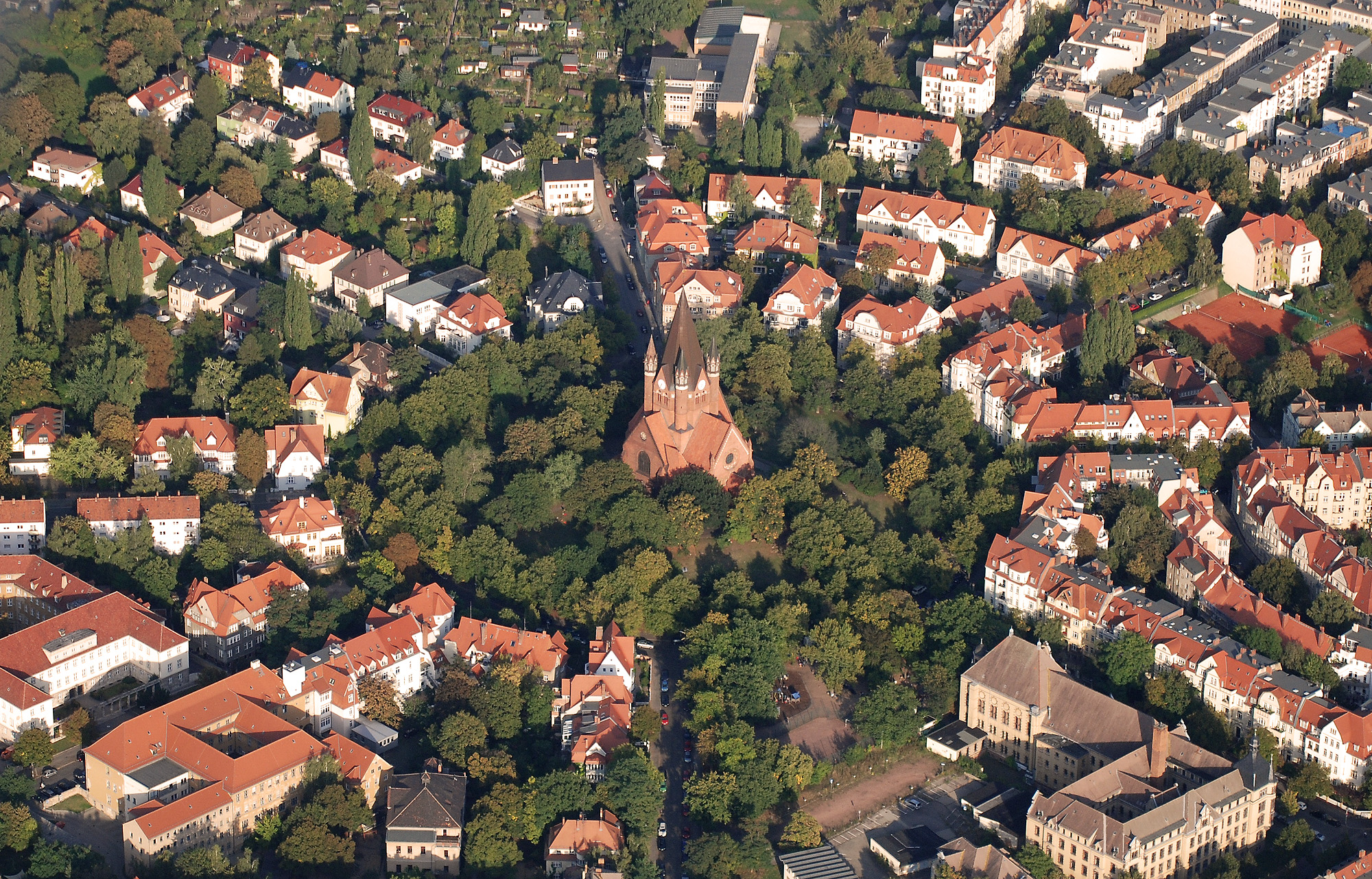 Luftaufnahme des Rathenauplatzes mit Pauluskirche in Bildmitte.